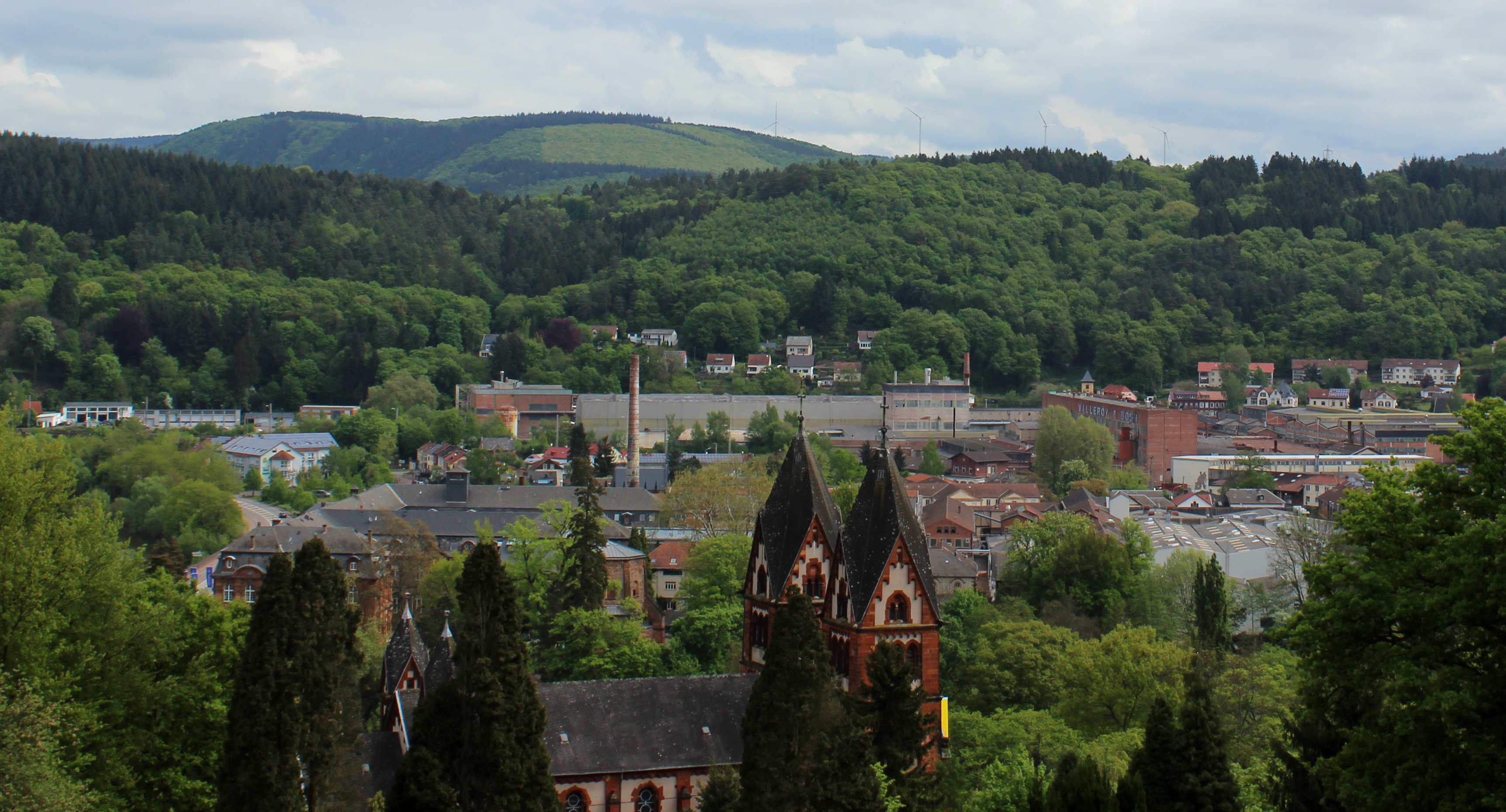 Mettlach, Landkreis Merzig-Wadern, Saarland